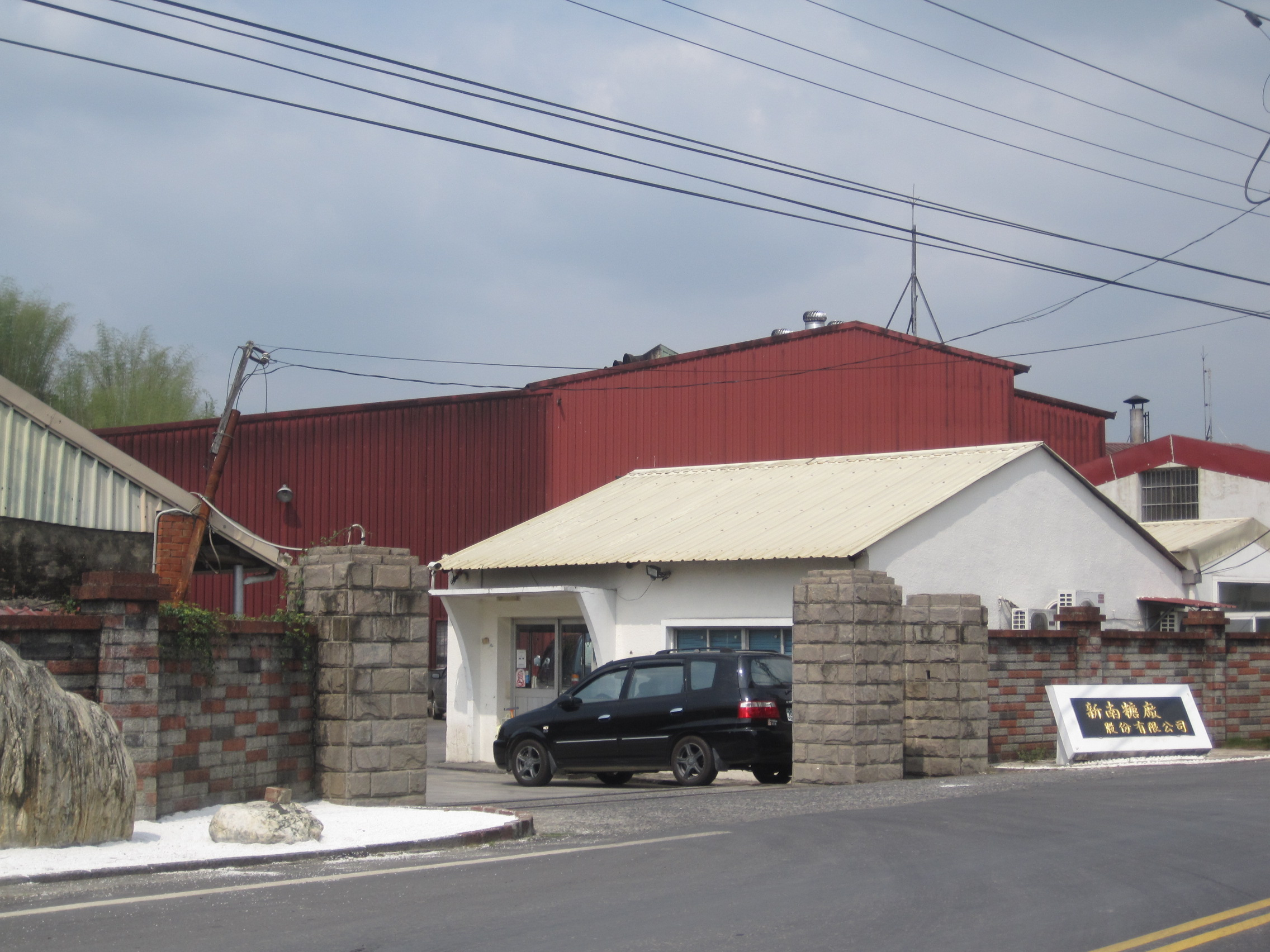 位於臺灣臺南市南化區的新南糖廠